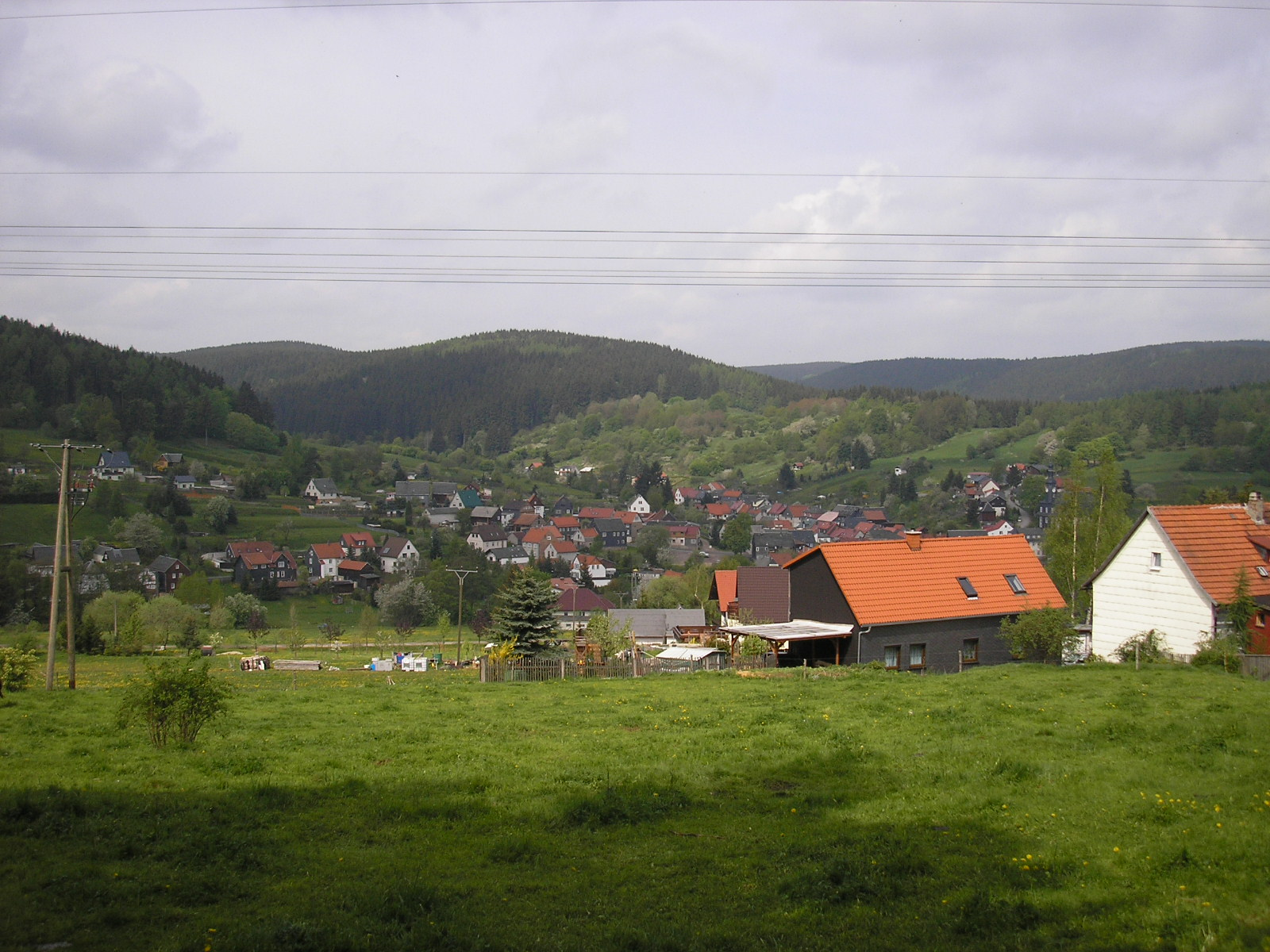 Blick über Möhrenbach (Thüringen) vom Hang des Langen Berges aus.